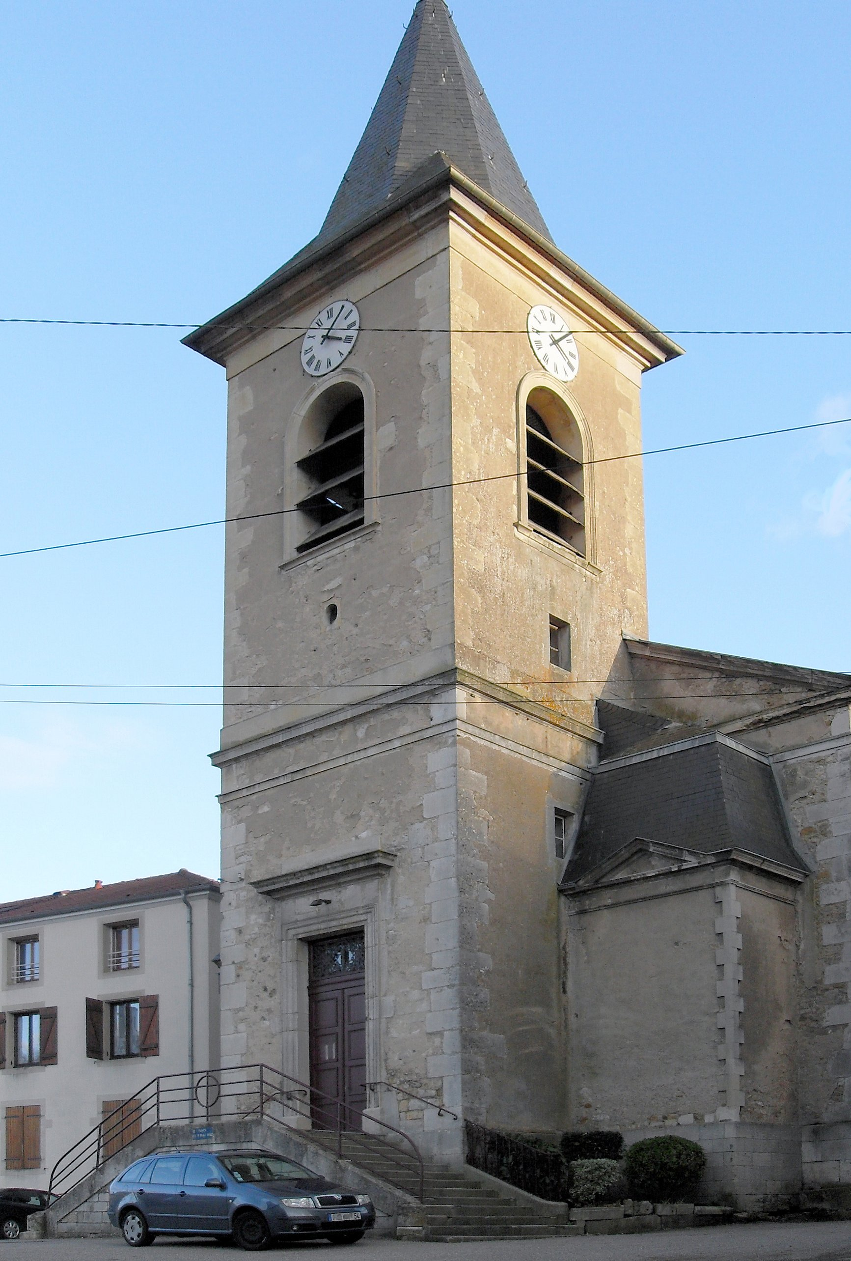 La tour d'église Saint-Gengoult à Marbache